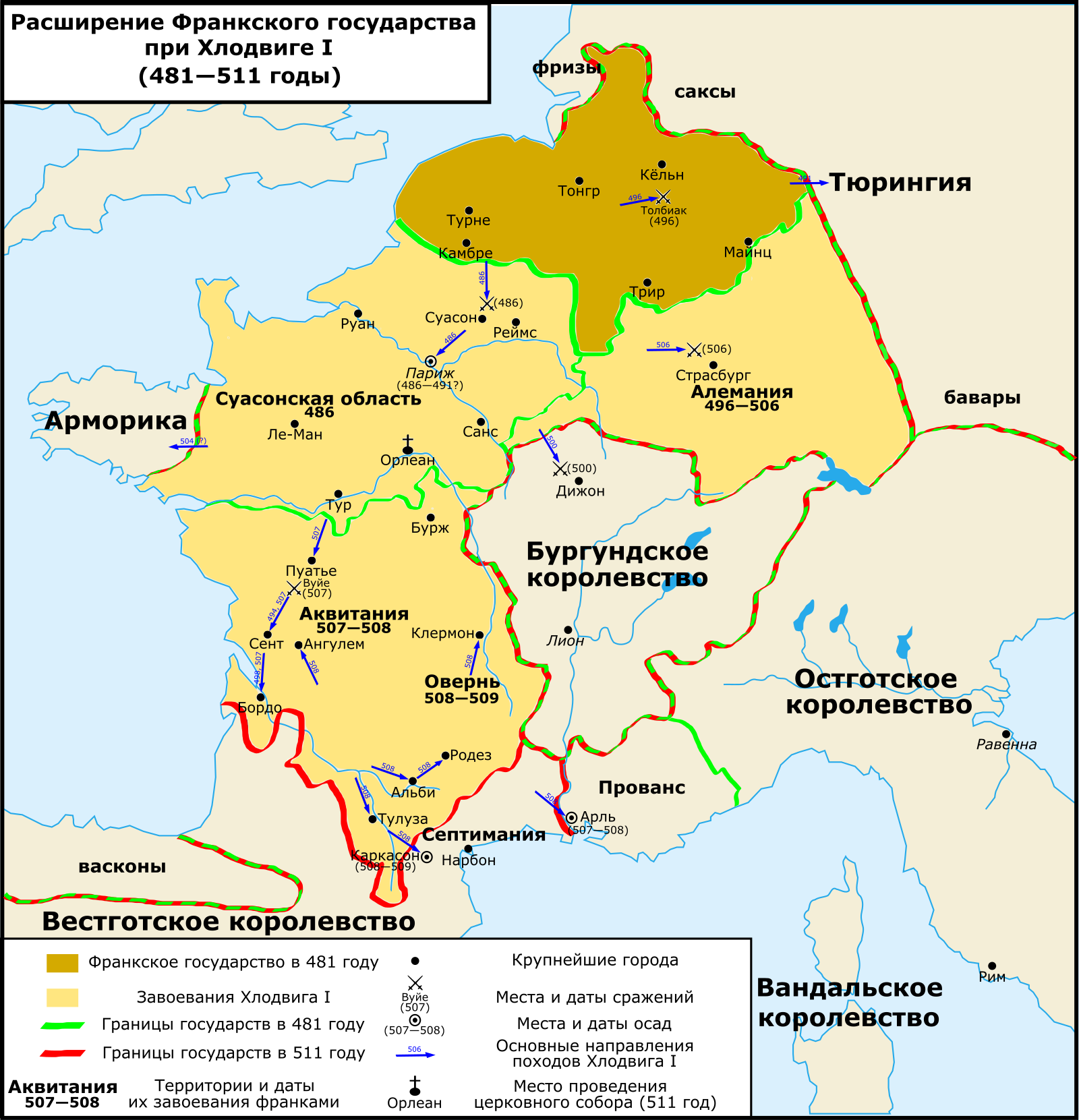 Расширение Франкского государства при Хлодвиге I (481—511)